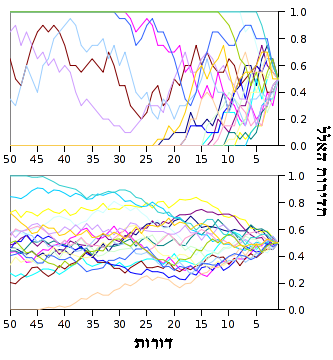 הדמיה של השפעת הסחף הגנטי על 20 אללים באוכלוסיות של 10 ושל 100 פרטים.